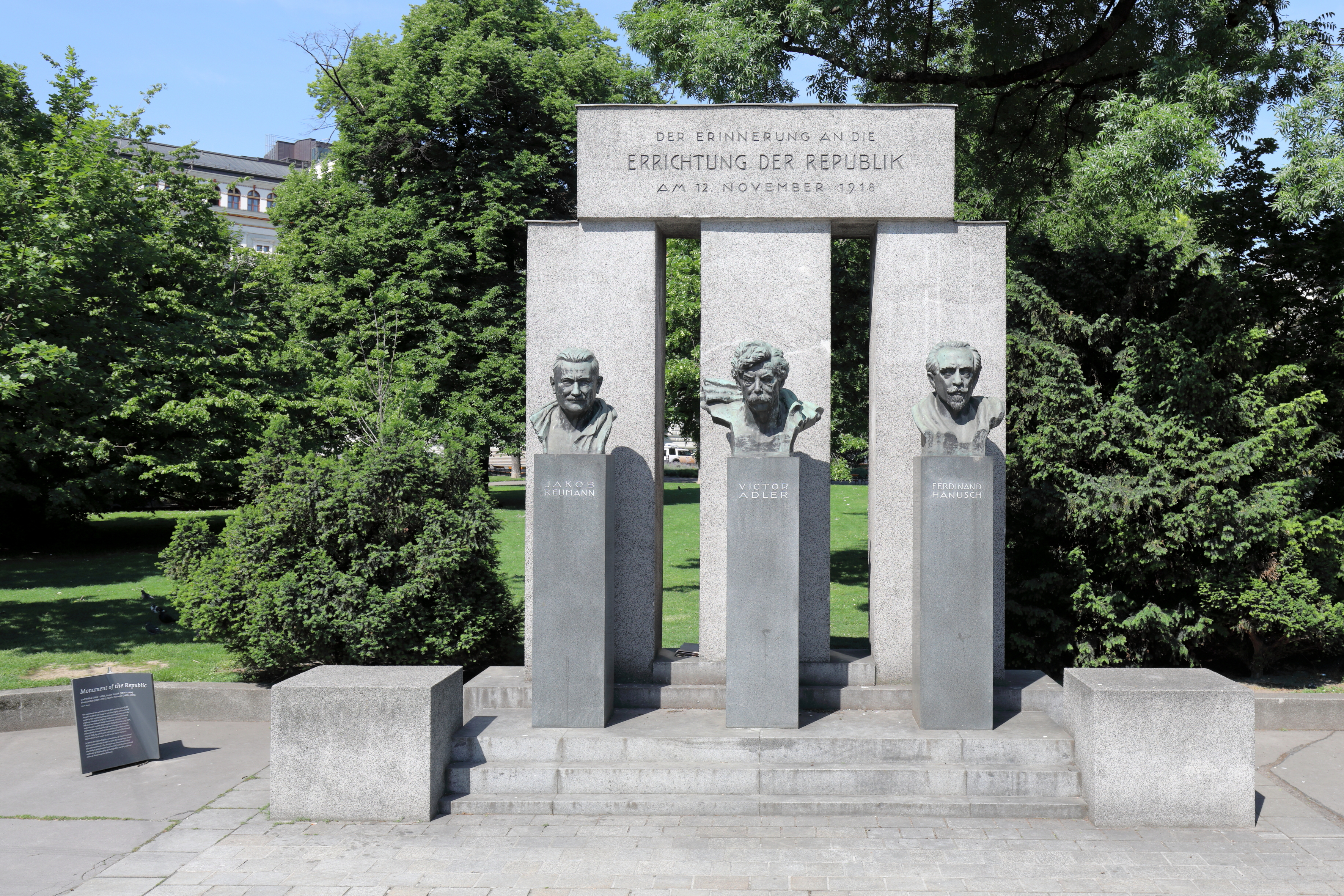 Das sozialistische Denkmal der Republik, auch Republikdenkmal bezeichnet, am Dr.-Karl-Renner-Ring zwischen dem Parlamentsgebäude und Palais Epstein im 1. Wiener Gemeindebezirk Innere Stadt.Das Denkmal mit der Inschrift im Architrav: „Der Erinnerung an die Errichtung der Republik am 12. November 1918“ wurde nach einem Entwurf von Anton Hanak unter dem sozialistischen Bürgermeister Karl Seitz anlässlich des zehnten Jahrestages der Ausrufung der Republik Deutschösterreich errichtet und gedenkt der sozialdemokratischen Politiker Jakob Reumann, Victor Adler und Ferdinand Hanusch. Zur Zeit des Ständestaates wurde es demontiert und 1948 wieder aufgestellt. 2009 beschloss die Kulturkommission der Wiener Innenstadt einstimmig die Anbringung einer Texttafel - „auch als Zeichen, dass die heutige Politik aus der gespaltenen Erinnerung an die Gründung der Republik und die schweren Krisen der Demokratie gelernt hat.“